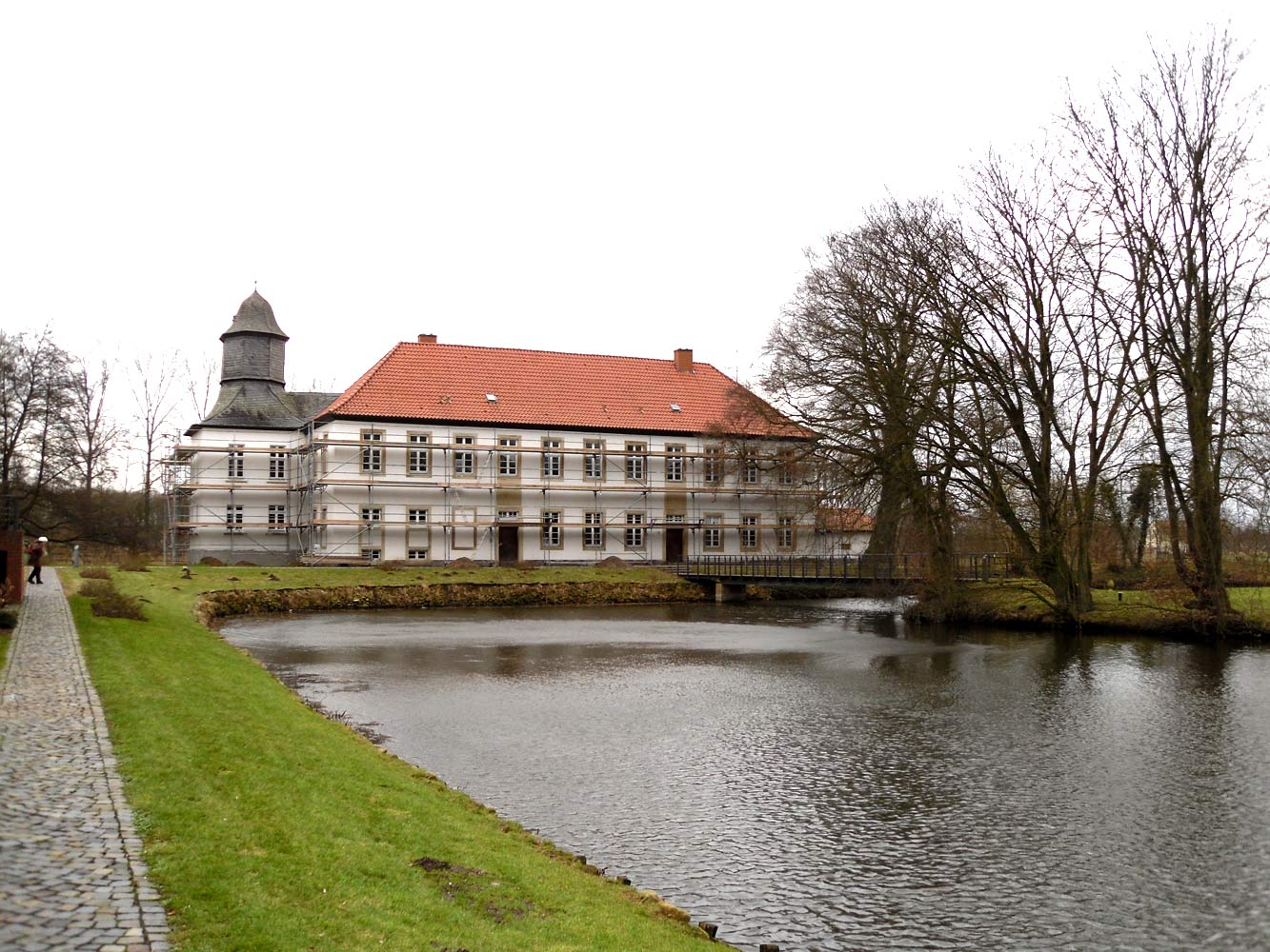 Datteln-Ahsen